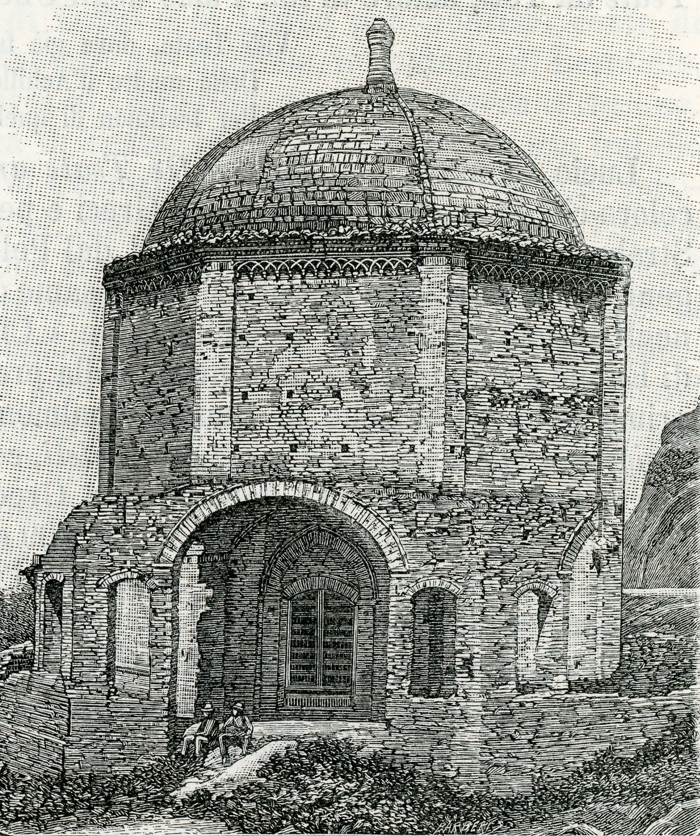 Chieti: chiesa di Santa Maria del Tricaglio (xilografia di Barberis 1898).